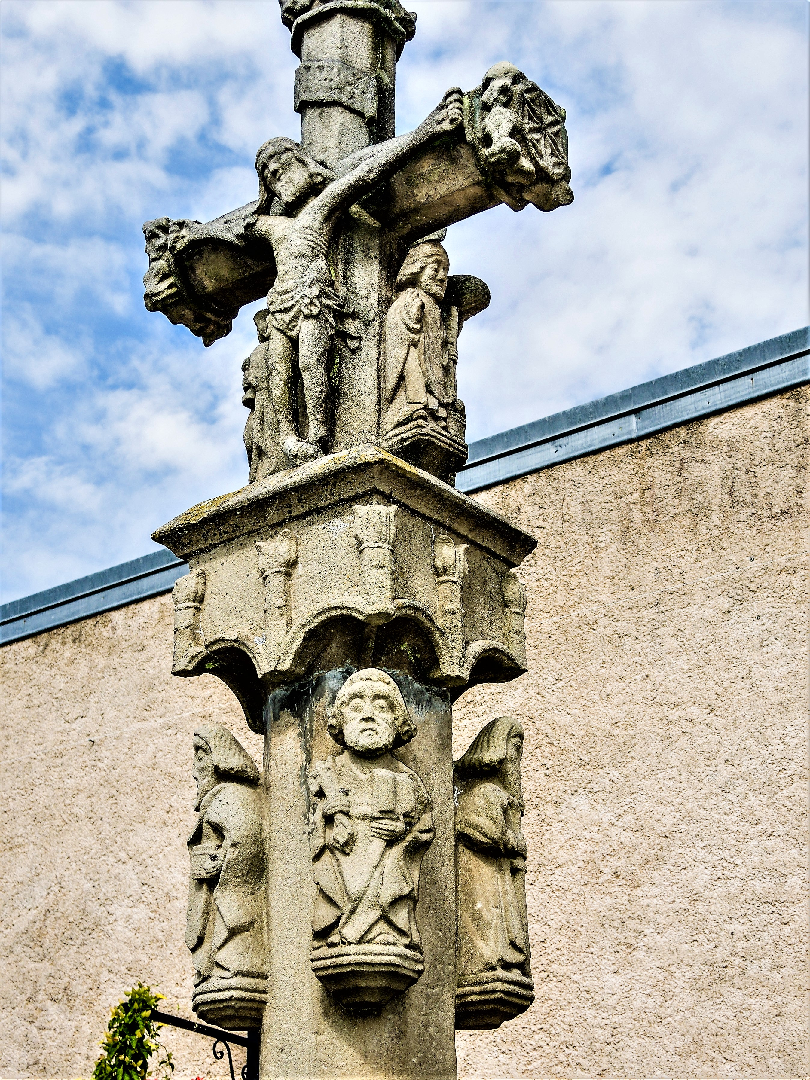 Croix